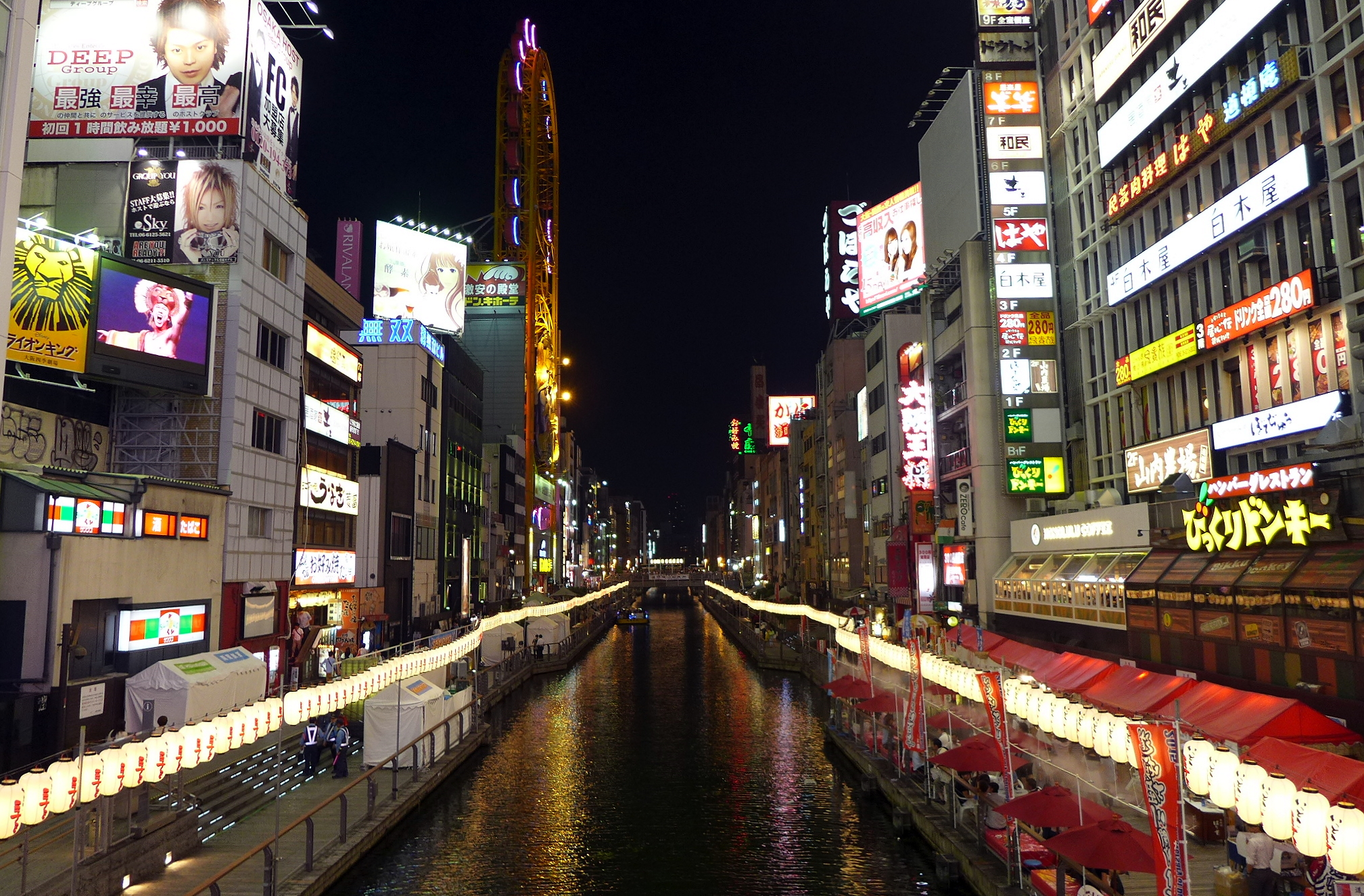 Dōtonbori River Night view